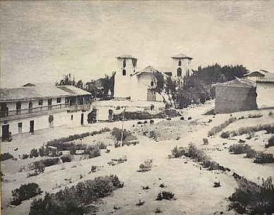 Plaza de Pampas Grande a inicios del siglo XX